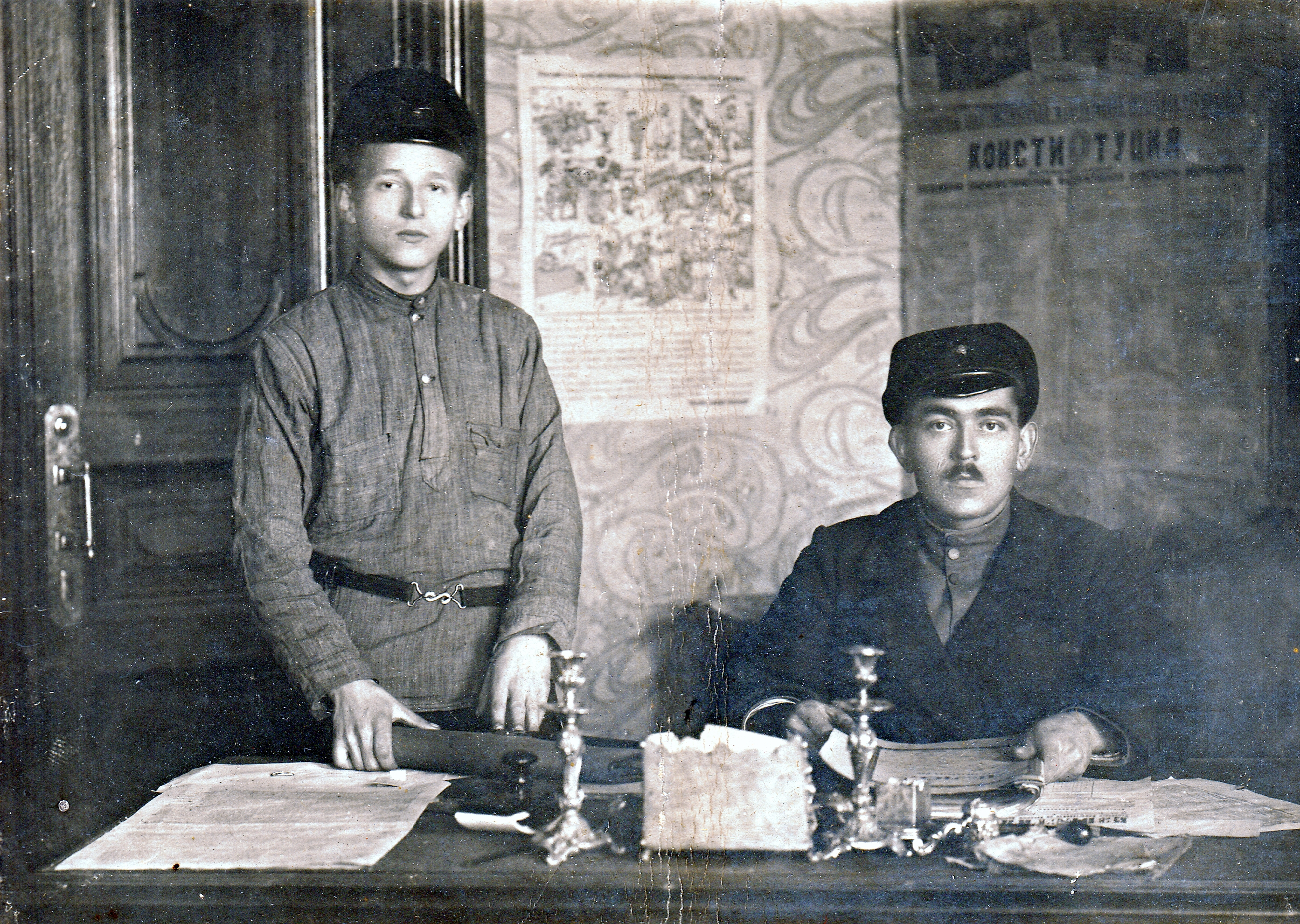 Василий Сергеевич Молодцов и комиссар Артемьев. 17 батальон. 1919 год.